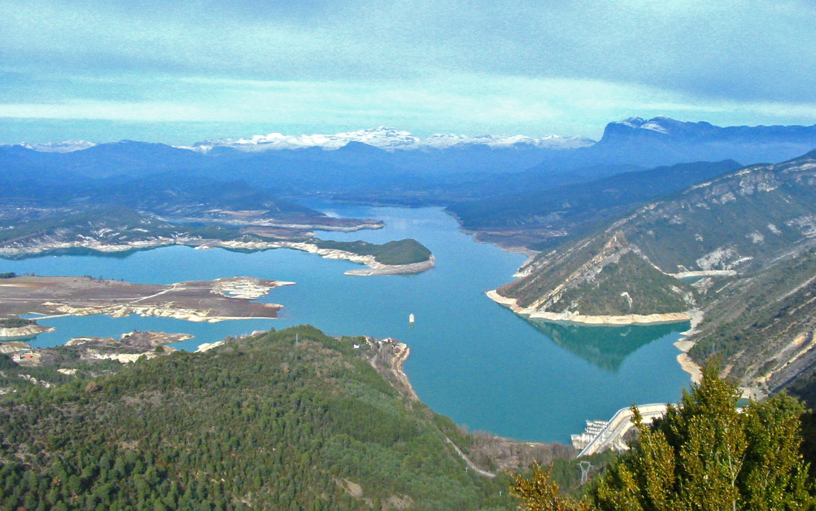 Embalse de Mediano (Mediano, Huesca, Aragón)